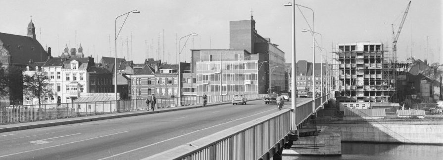 Overzicht: gezicht op de stad van af de Maas